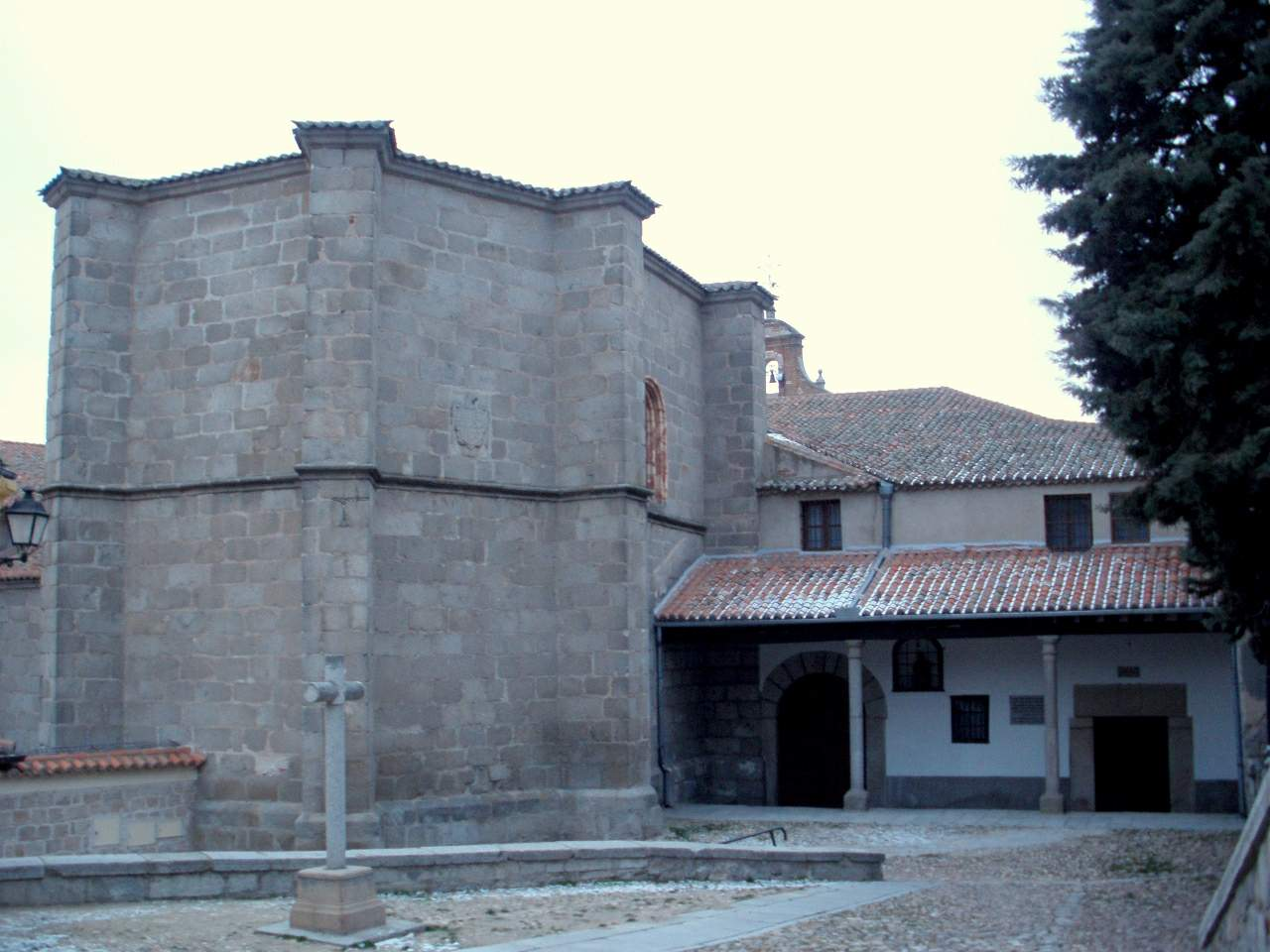 Convent of Nuestra Señora de Gracia, Ávila